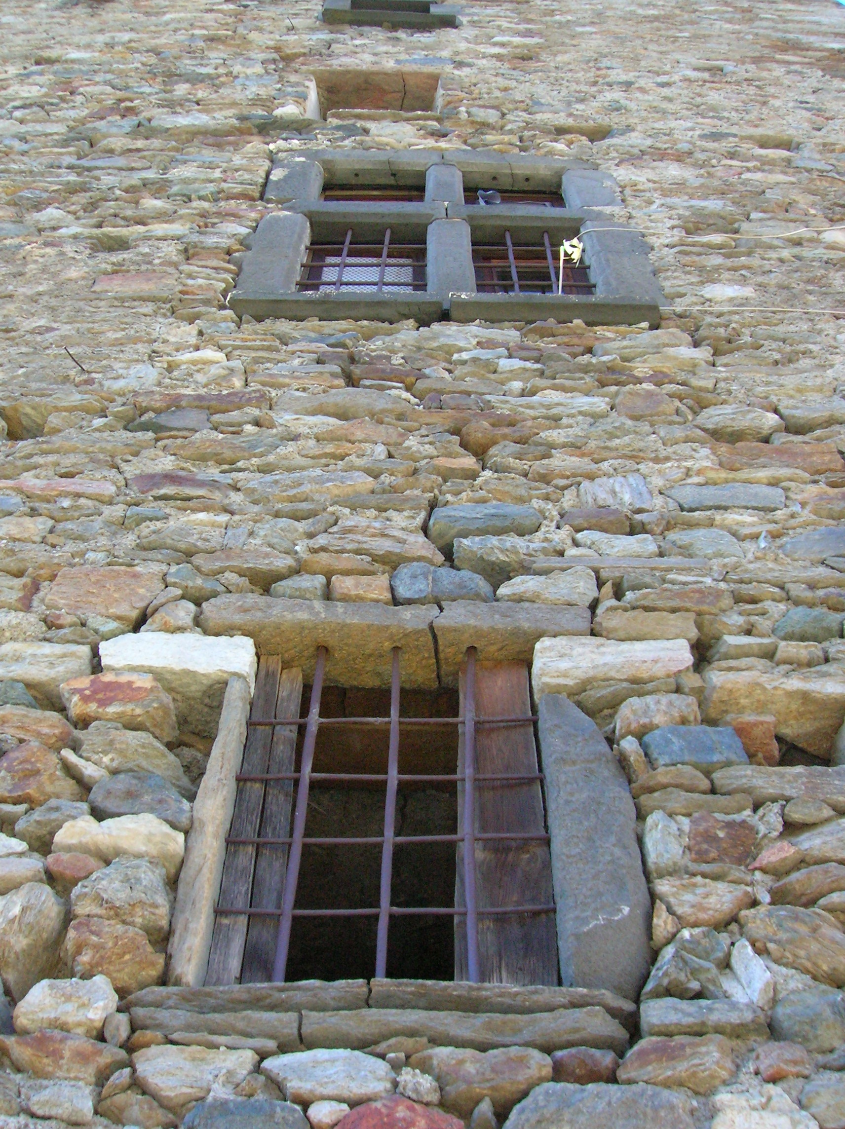 Castello dei Vallaise, Perloz, Valle d'Aosta, Italia.